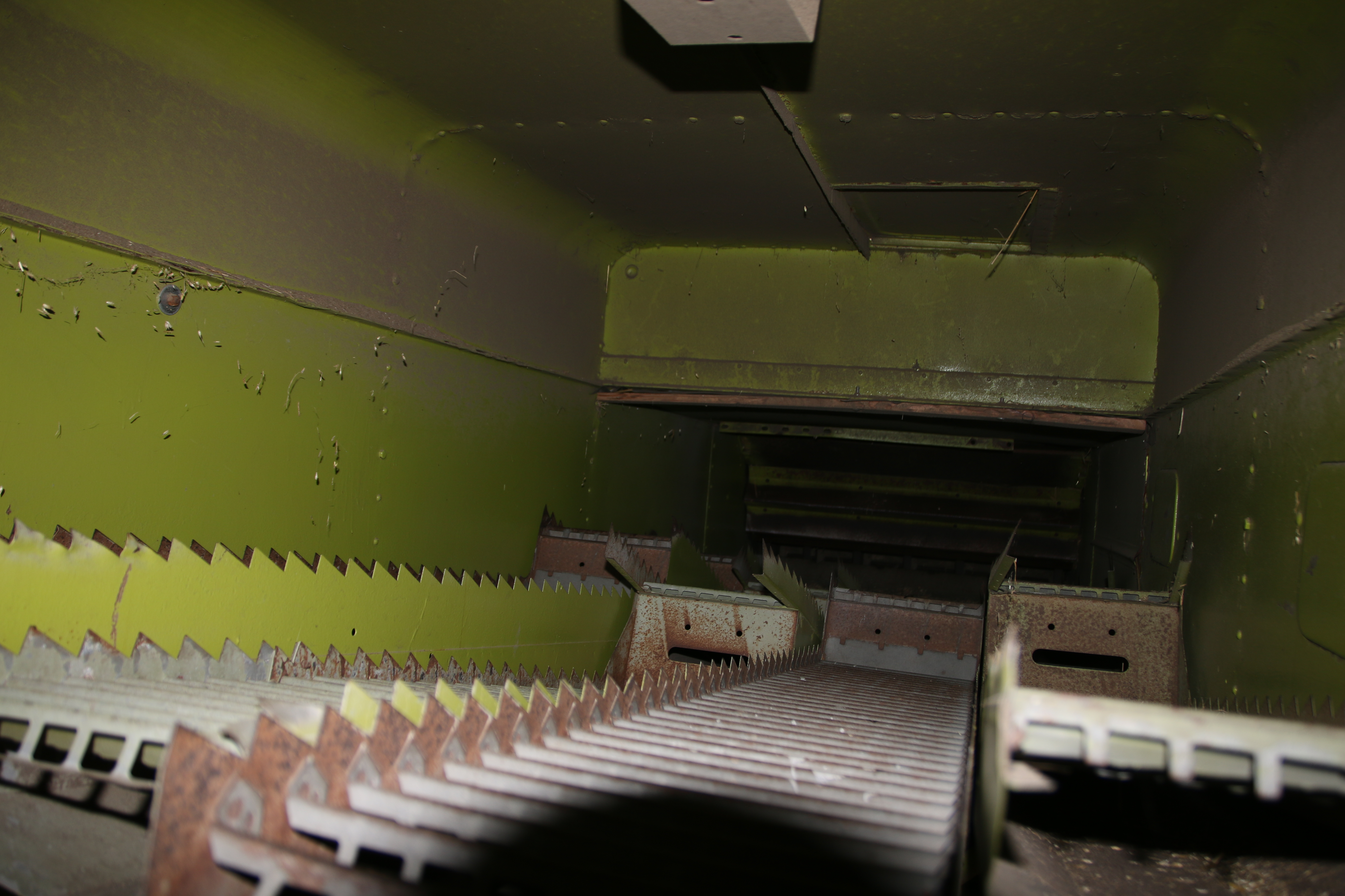 Schüttler eines Matador Gigant